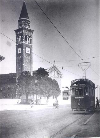 San Pietro di Gorizia - Tram